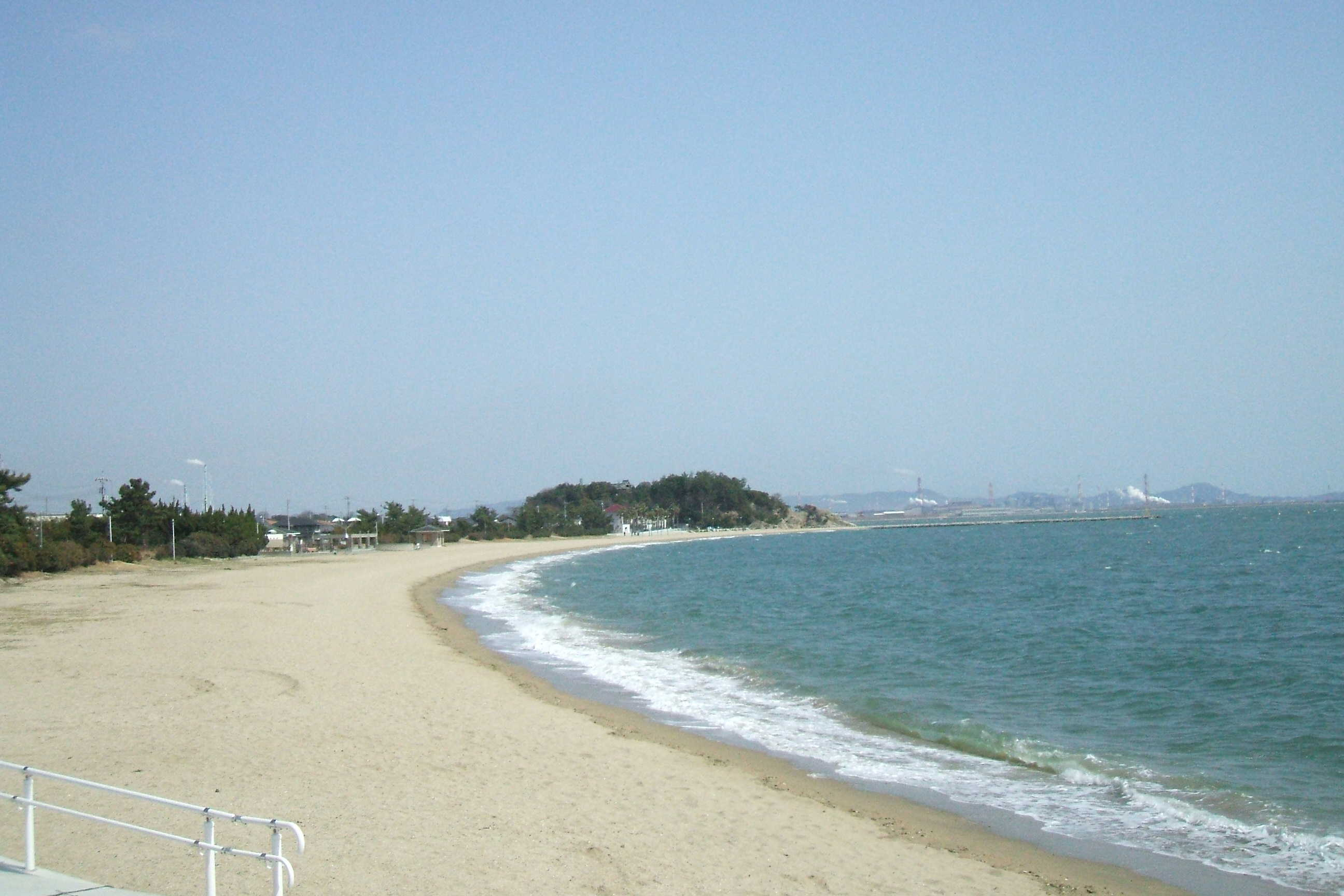 岡山県倉敷市にある沙美海岸の海水浴場